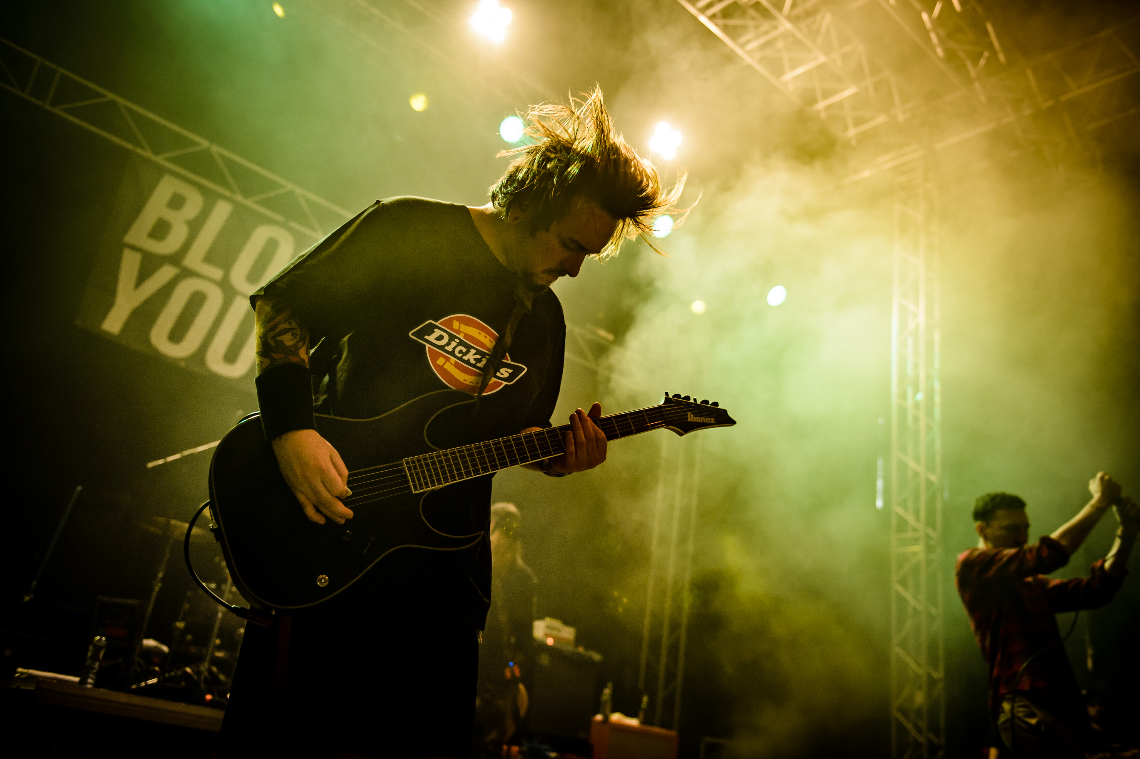 'Impericon Festival 2018; Turbinenhalle Oberhausen': 'Blood Youth'